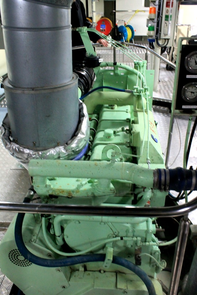 Blick auf den Hauptmotor